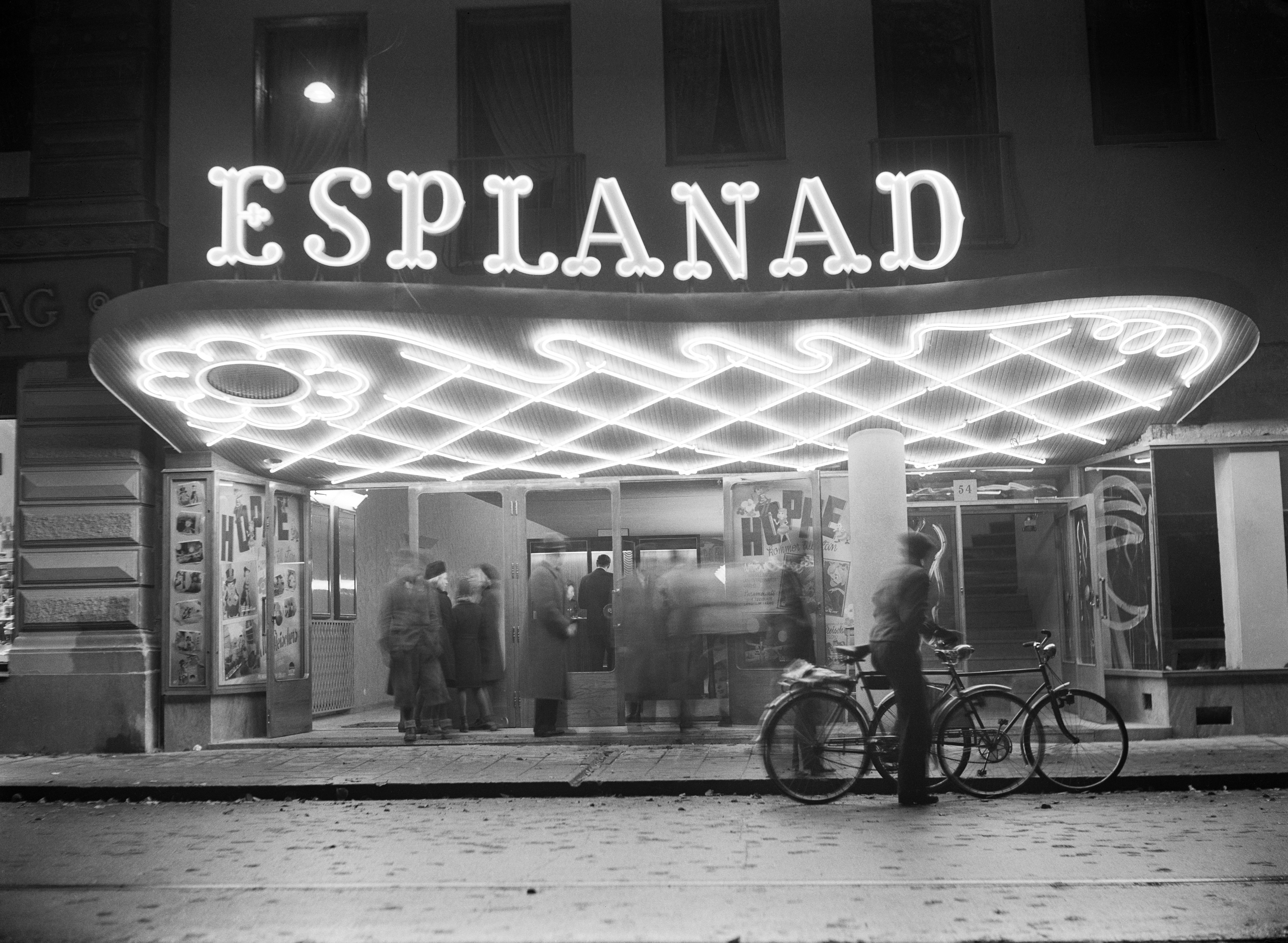 Stockholms nya biograf Esplanad. Biografen är ritad av arkitekten Ernst Grönwall